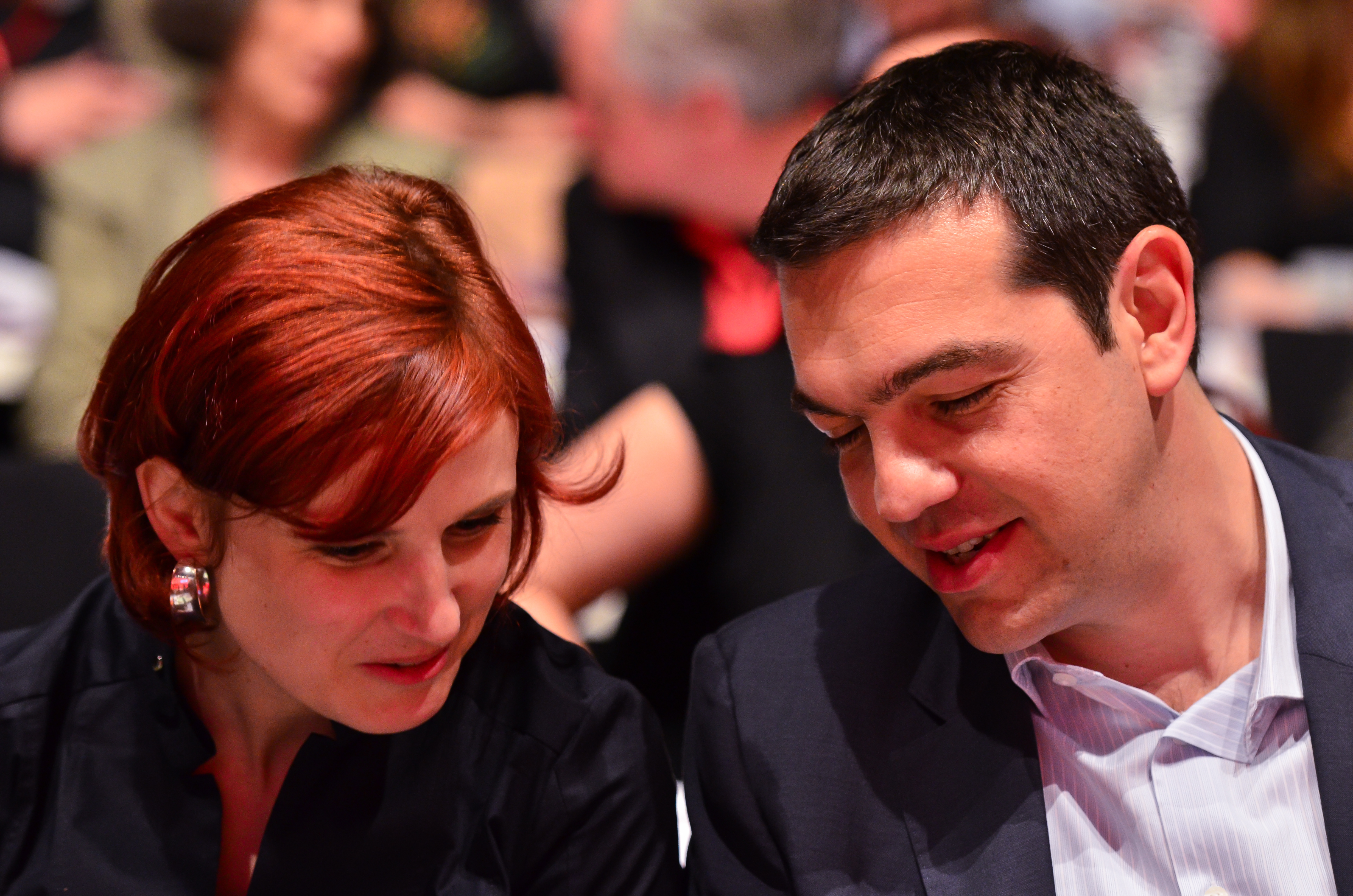 Bundesparteitag DIE LINKE Mai 2014 in Berlin, Velodrom: Alexis Tsipras, Spitzenkandidat für die Europawahl 2014 der Europäischen Linken